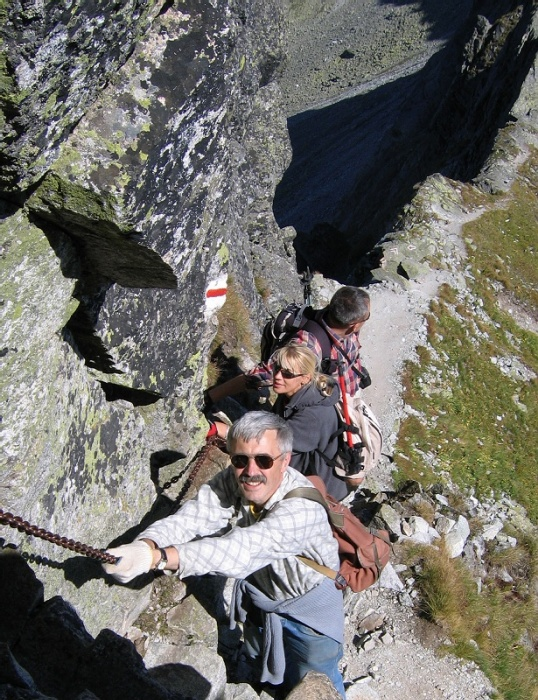 Zejście na Pościel Jasińskiego. Zdjęcie wykonałem własnoręcznie. Wyrażam zgodę na przetwarzanie bez mojej zgody.